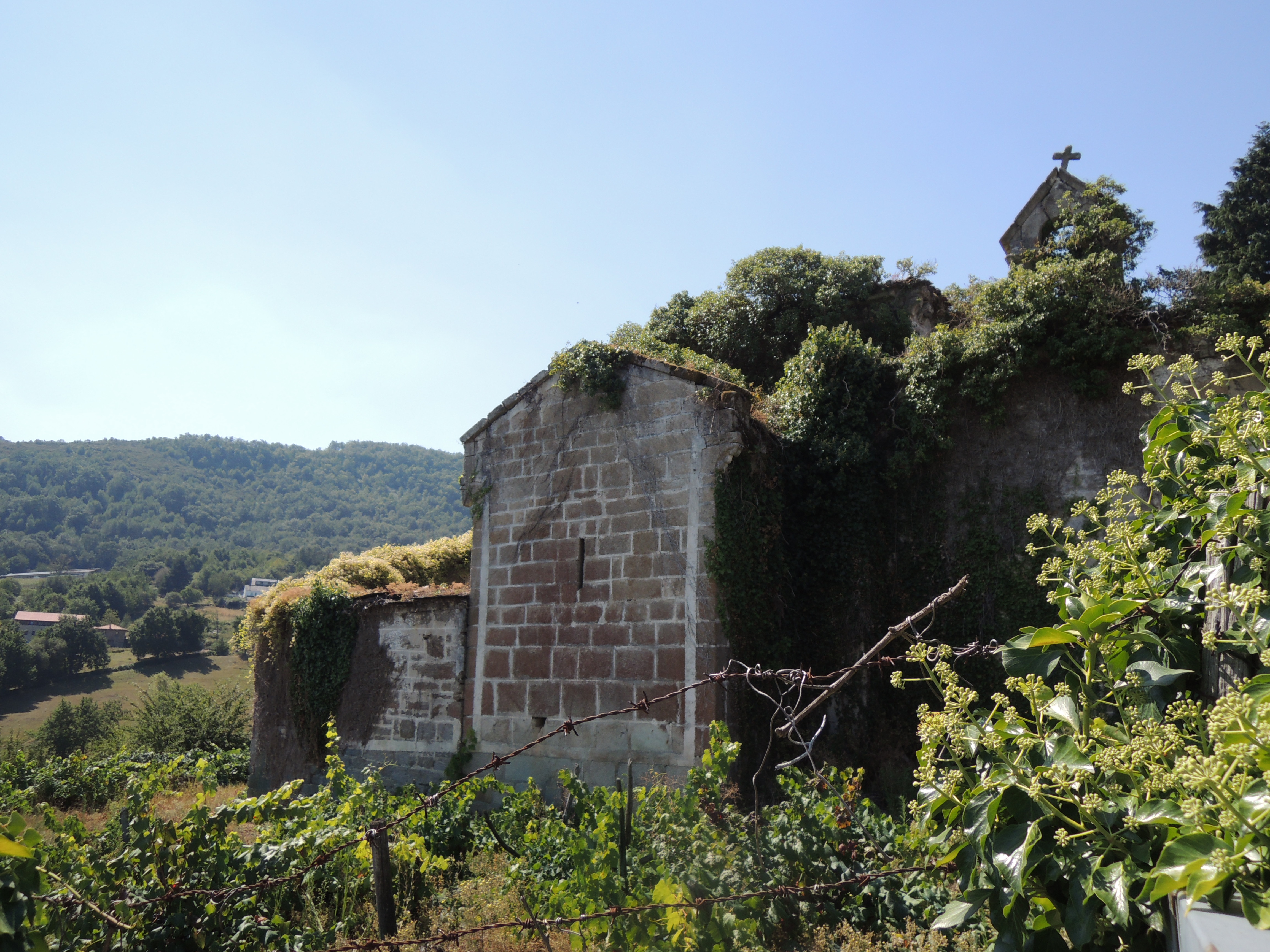 Cabecera de la iglesia. Esta foto participó en el juego En otro lugar de Flickr.